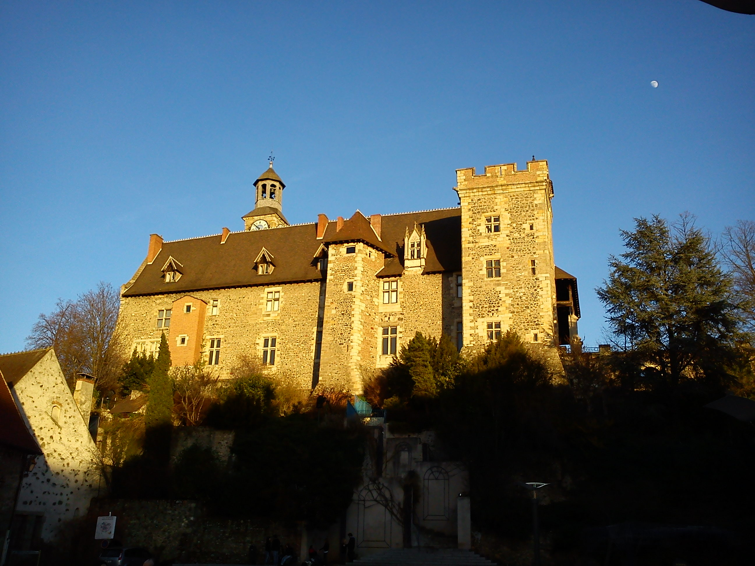 Chateau des Ducs de Bourbon de Montluçon